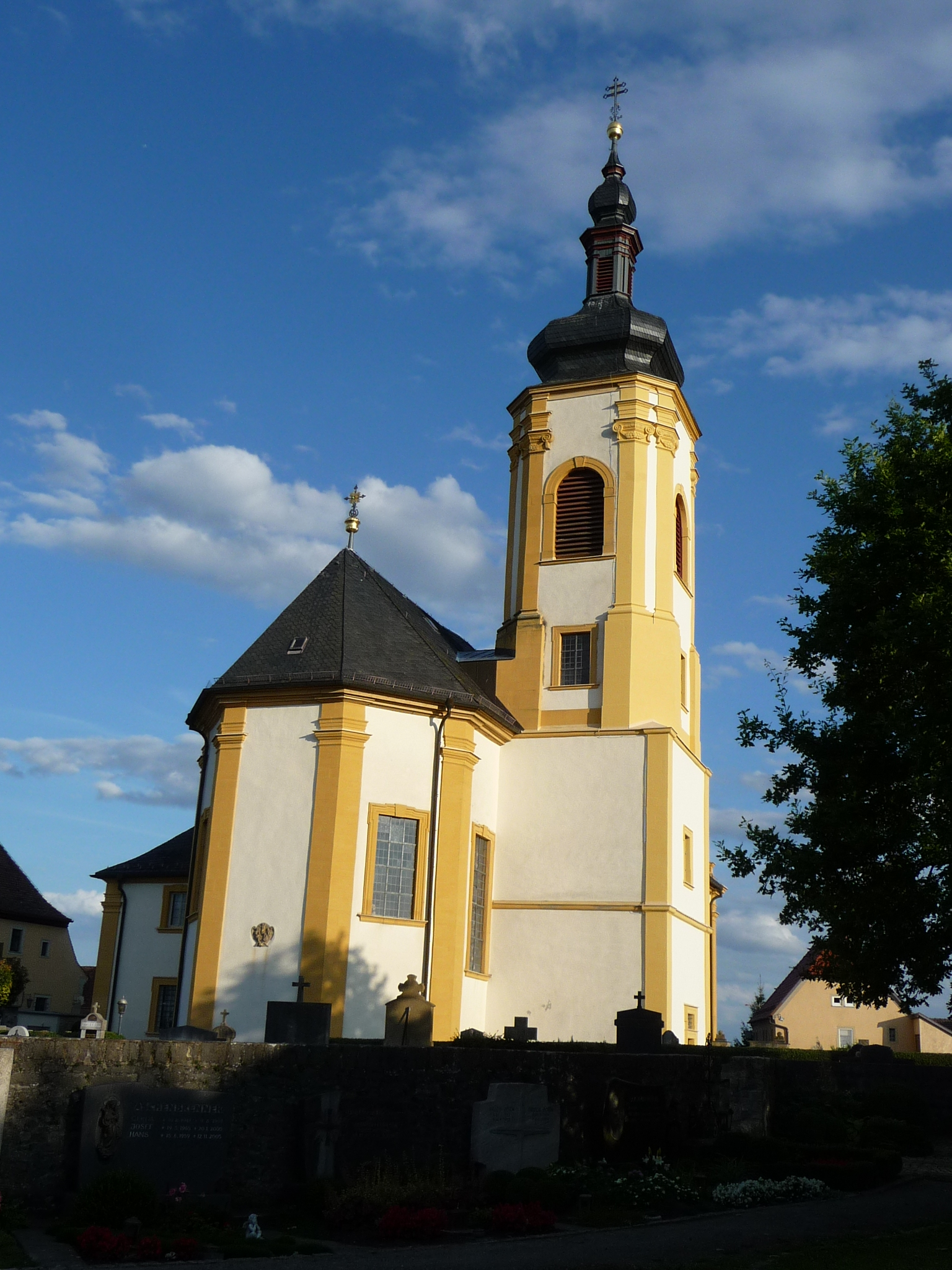 katholische Kirche Heiliger Schutzengel und Jakobus der Ältere in Gaukönigshofen, Unterfranken